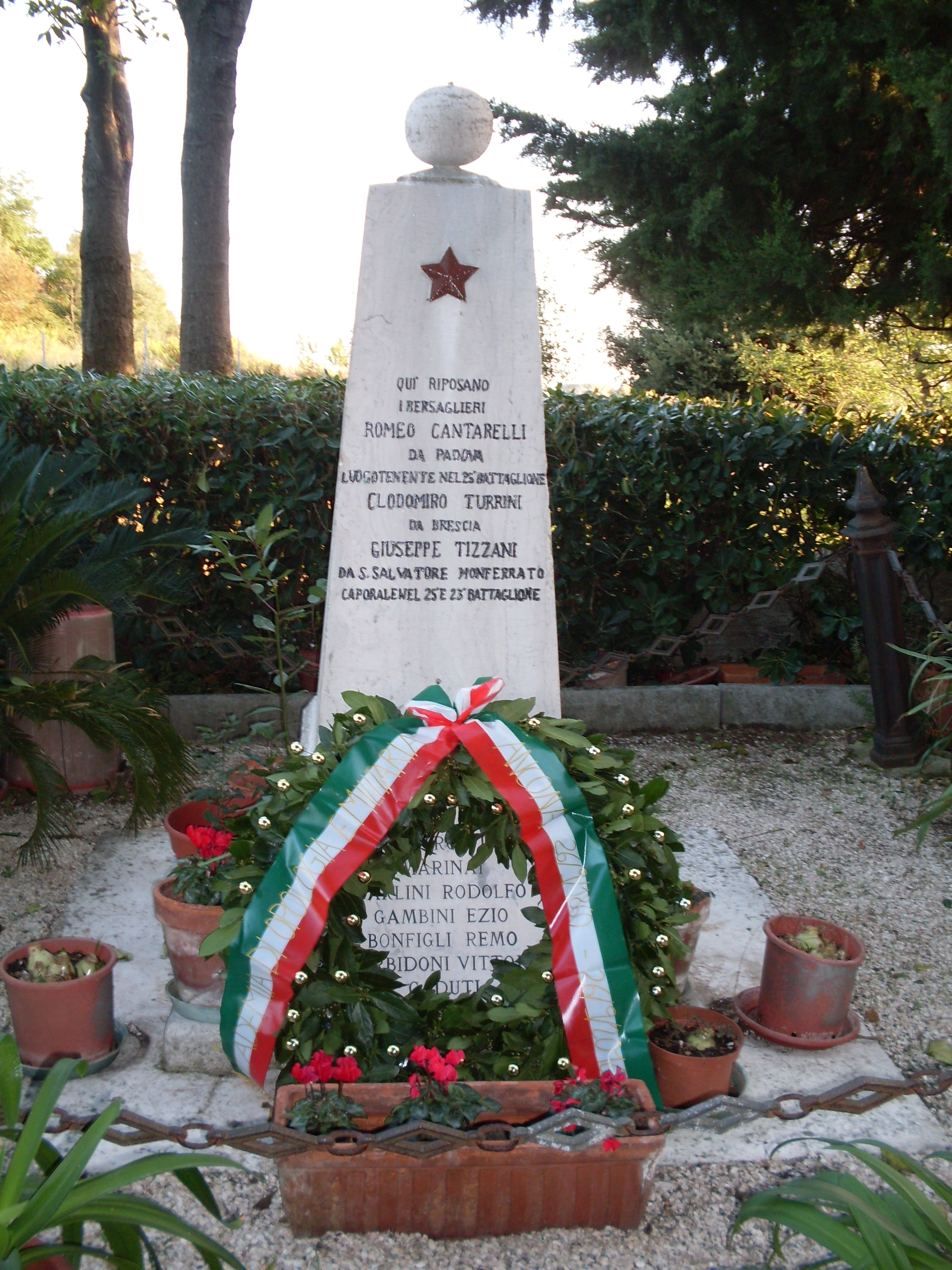 Pietralacroce monumento caduti 1860 sotto i caduti del 2° conflitto